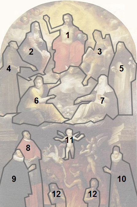 Structure du Perdono di Gesualdo